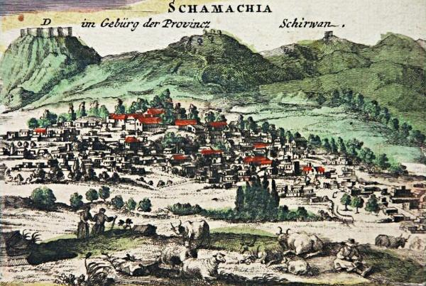 Шемаха, Ширван